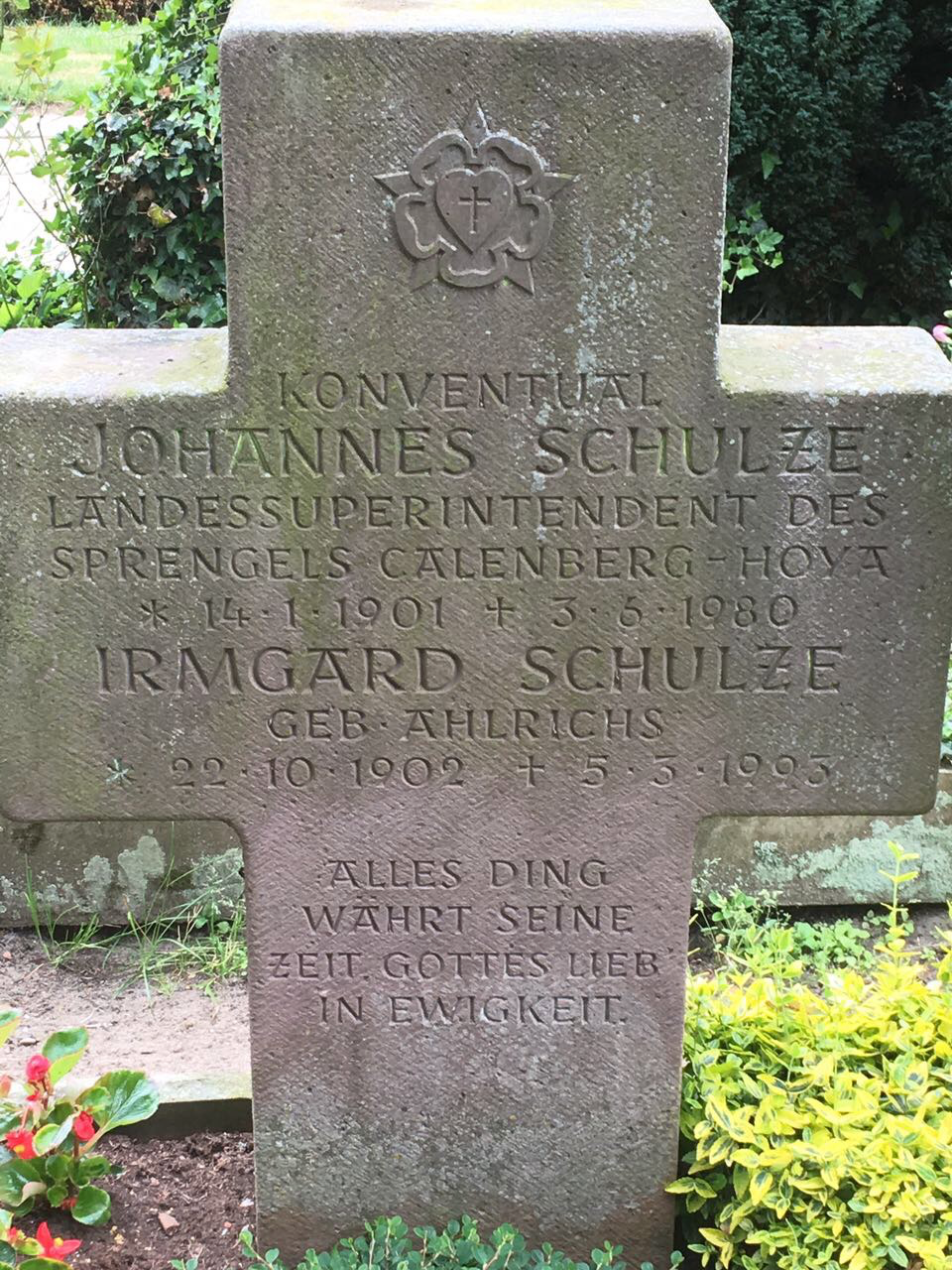 Grabstein des Loccumer Konventuals Johannes Schulze